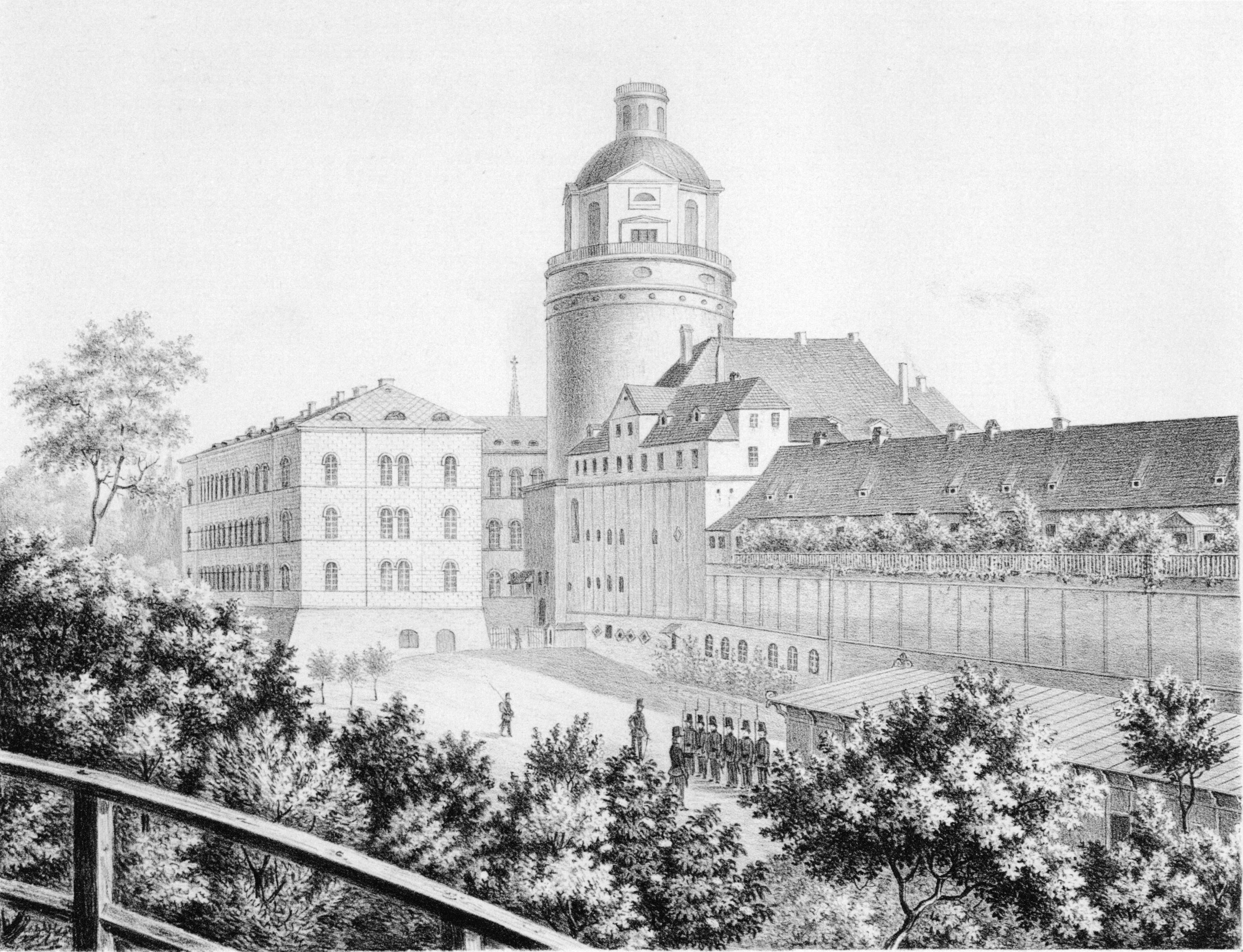 Die Pleißenburg in Leipzig aus: Album der Rittergüter und Schlösser im Königreiche Sachsen Leipziger Kreis Section: I